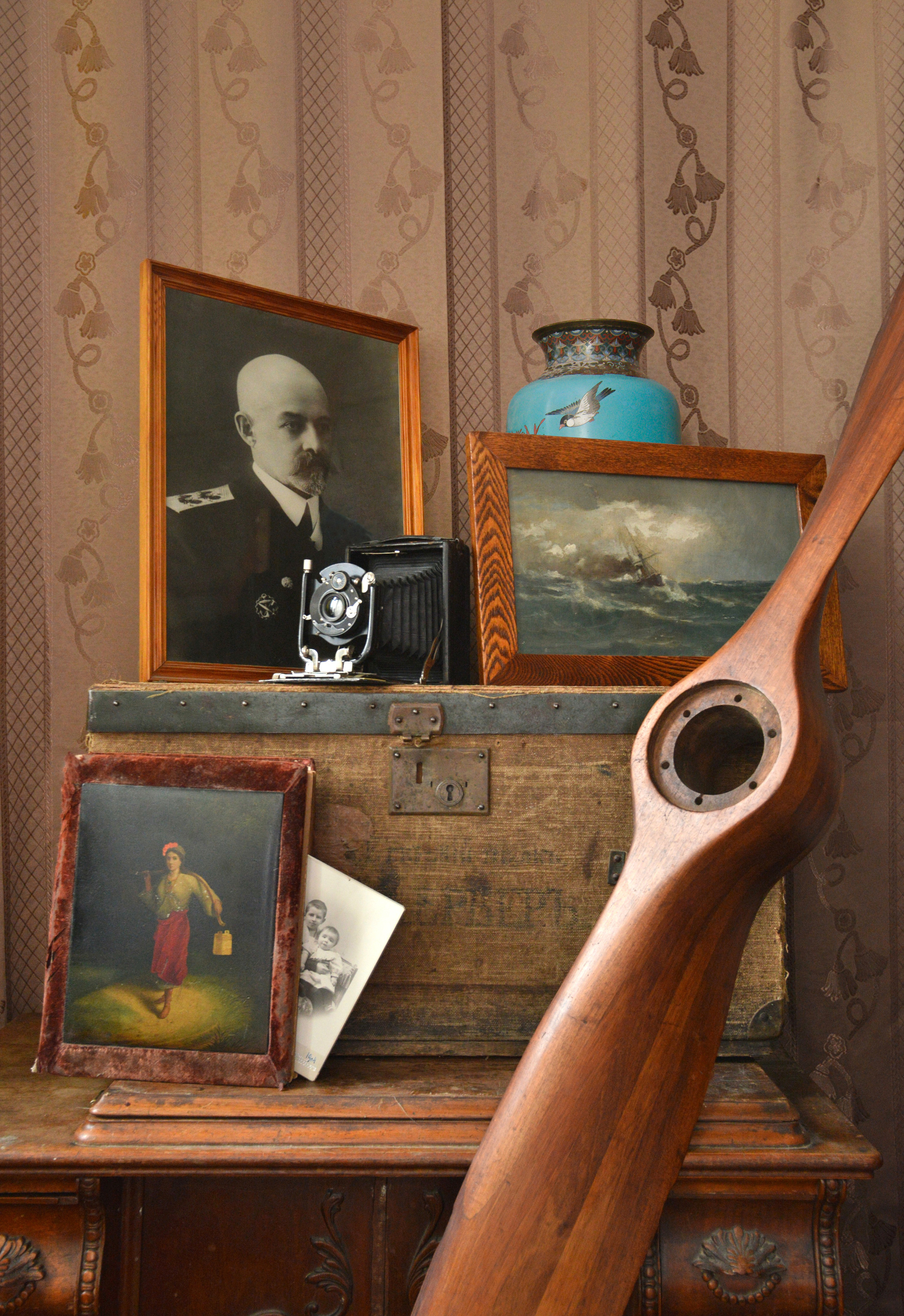 Винт самолёта-амфибии Ш-1, сохраняемый в семье одного из его авторов В. Л. Корвин-Кербера после гибели машины в 1930 году.